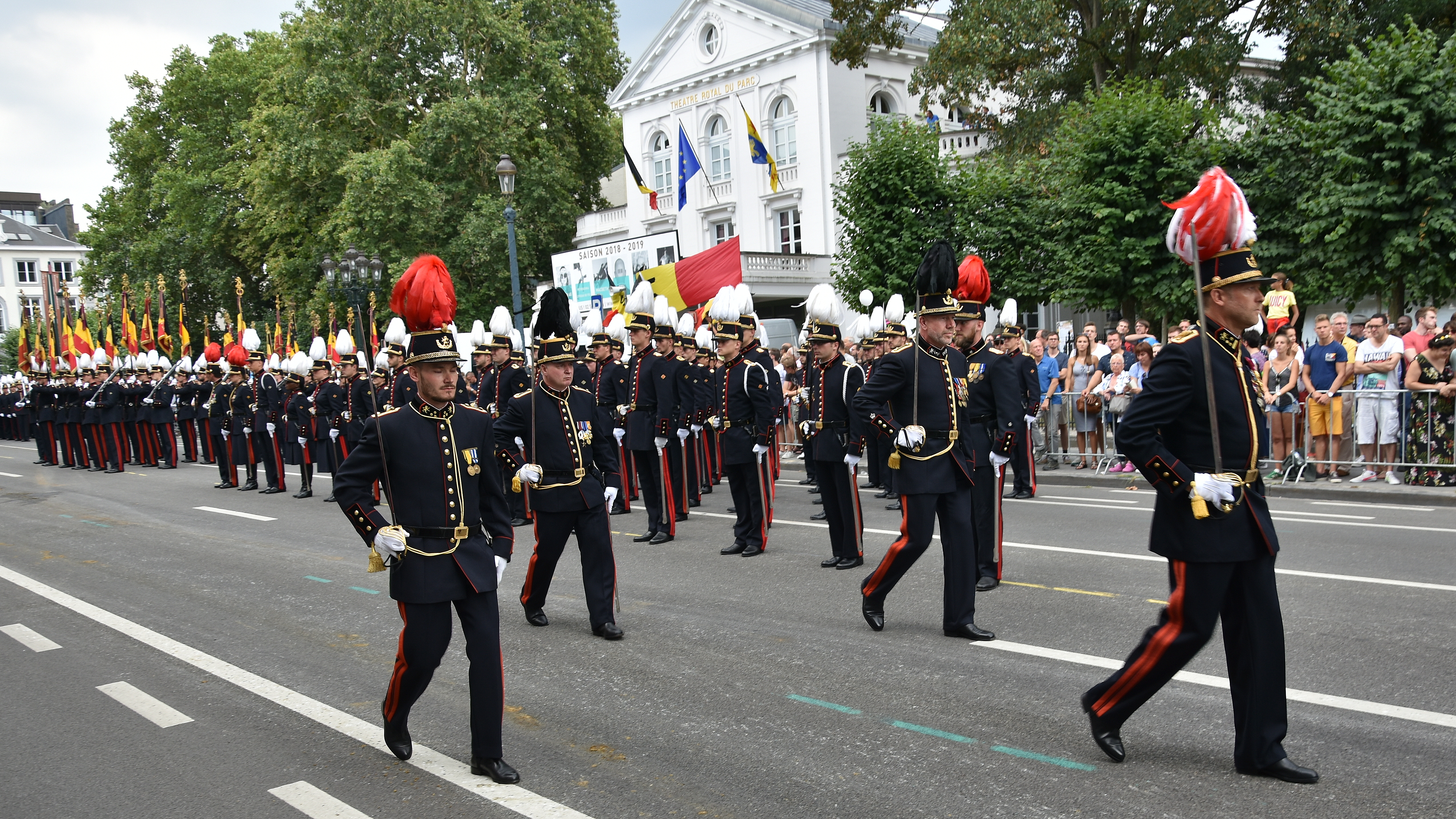 Koninklijke Militaire School (België) - Nationaal defilé 21-07-2018 15-45-01 This photo of immaterial heritage has been taken in the Brussels Capital Region